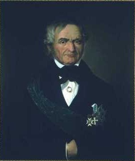 Norwegian: Hilmar Meincke Krohgtitle QS:P1476,no:"Hilmar Meincke Krohg" label QS:Lno,"Hilmar Meincke Krohg"